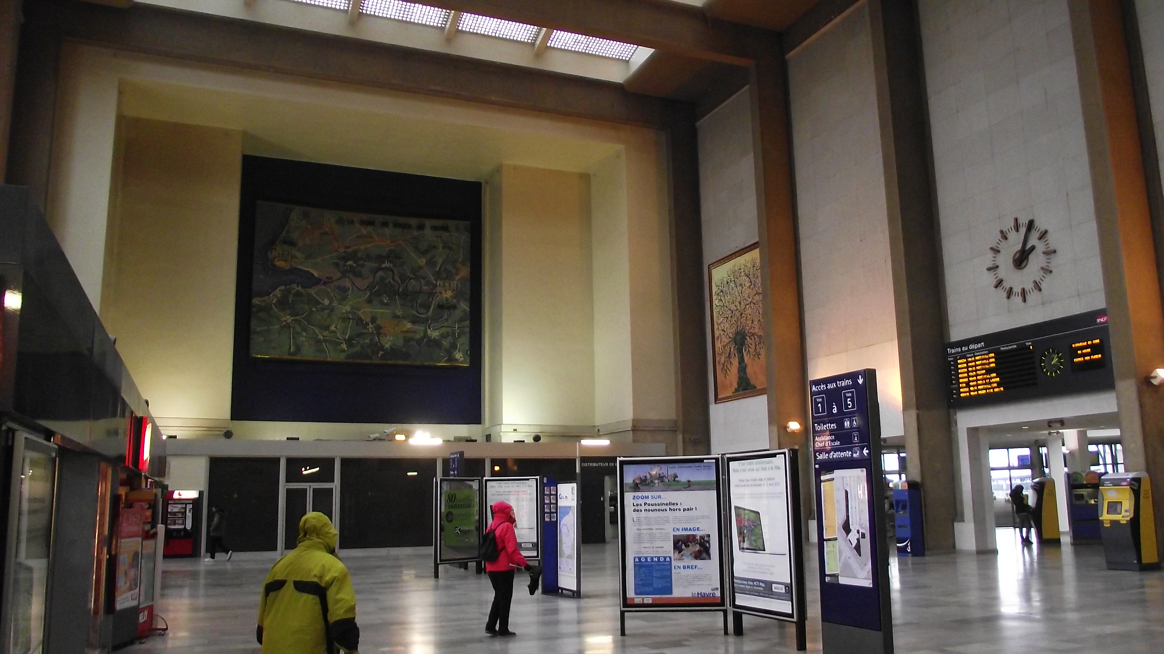 Ingangshal van het station